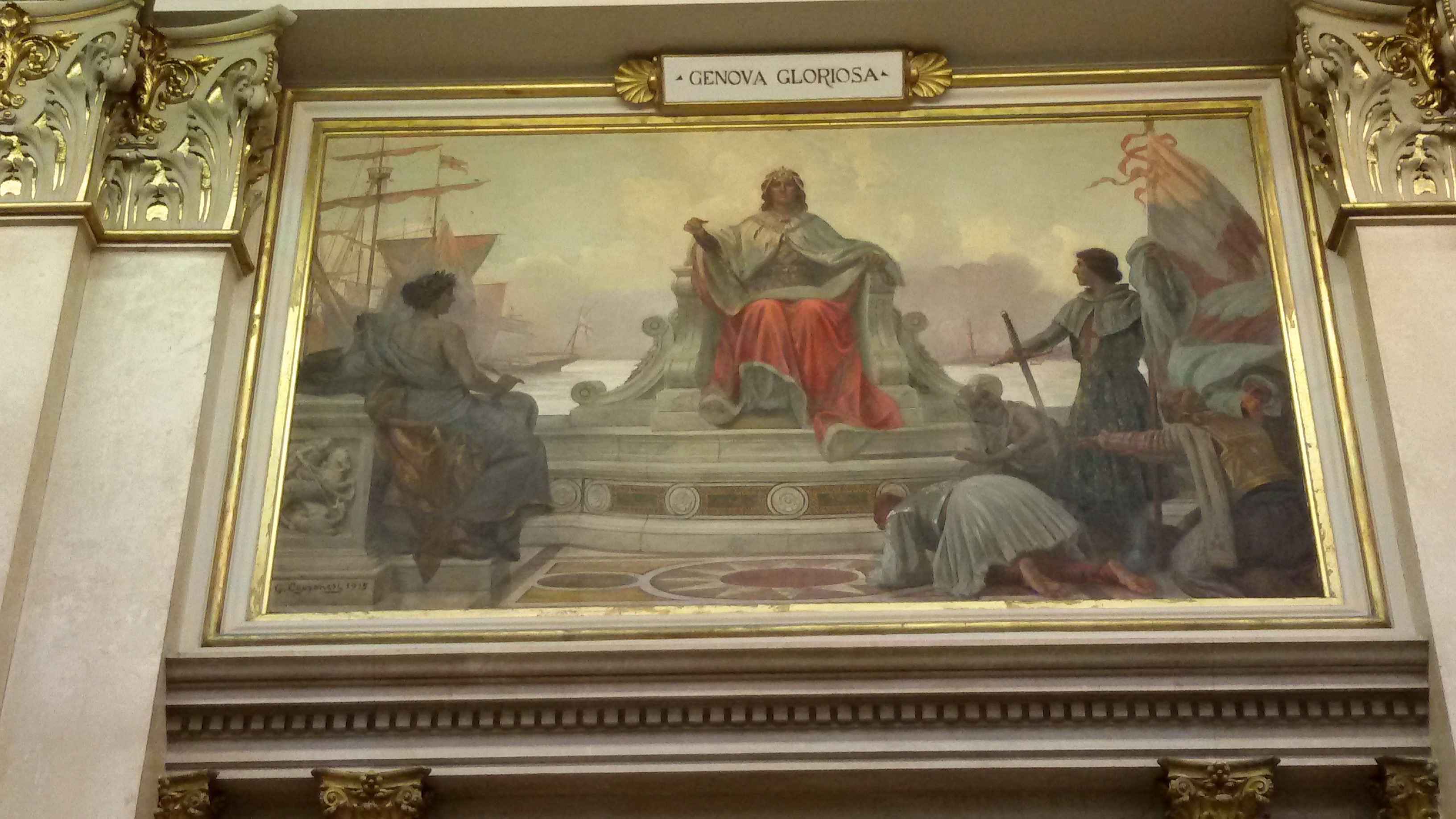 Particolare delle tele del salone